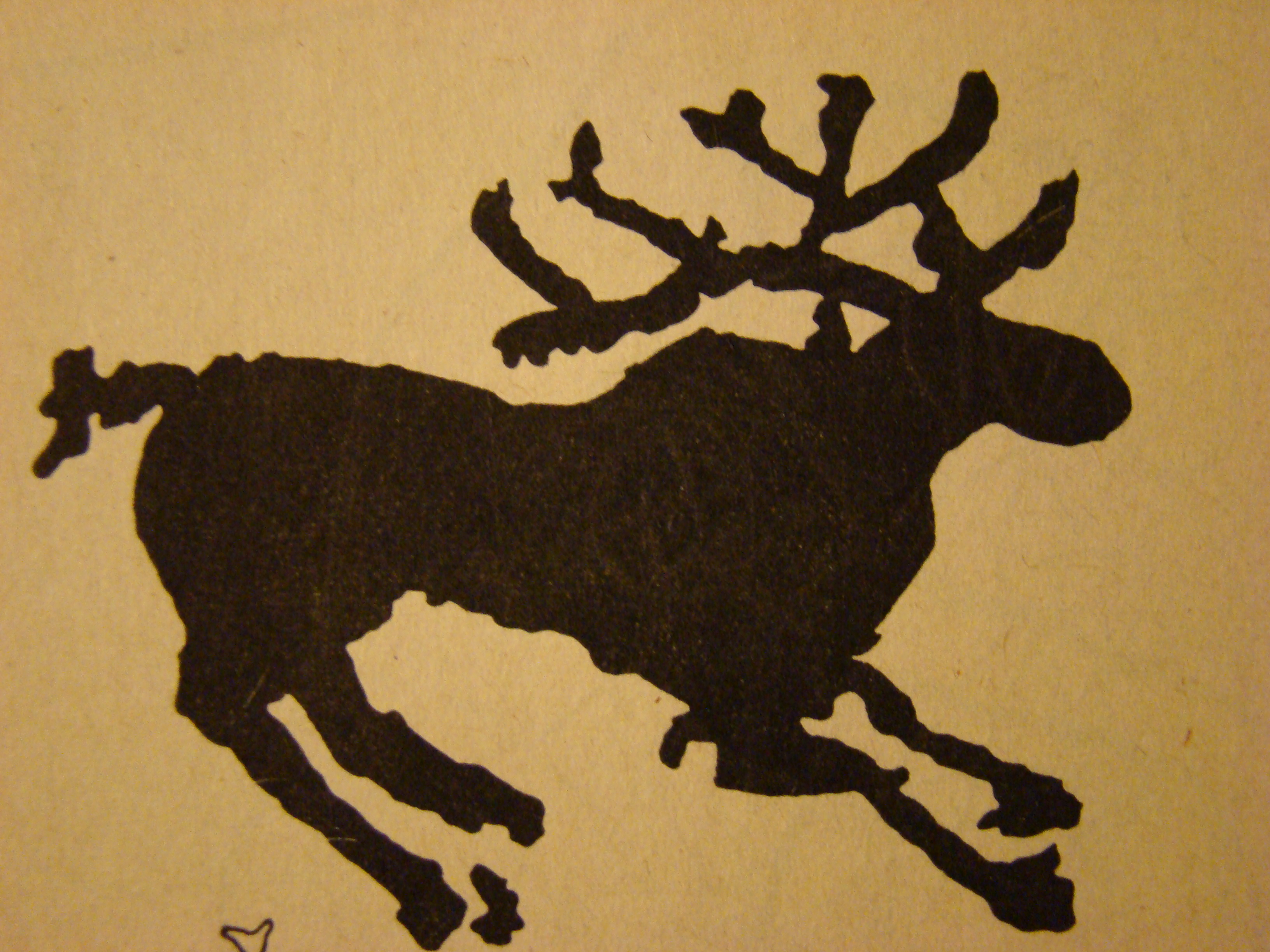 Фигура оленя на скале горы Бага-Заря